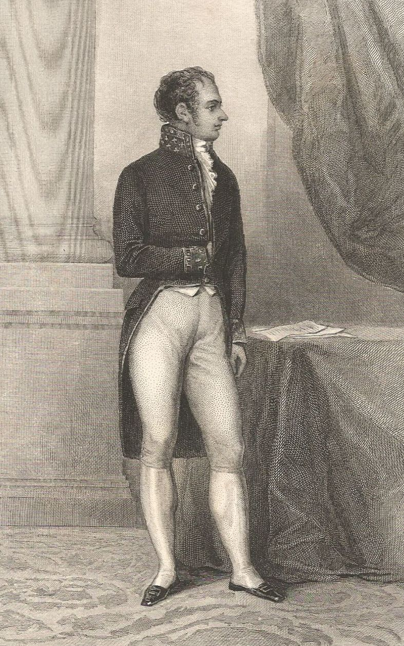 portrait en pied ; gravure